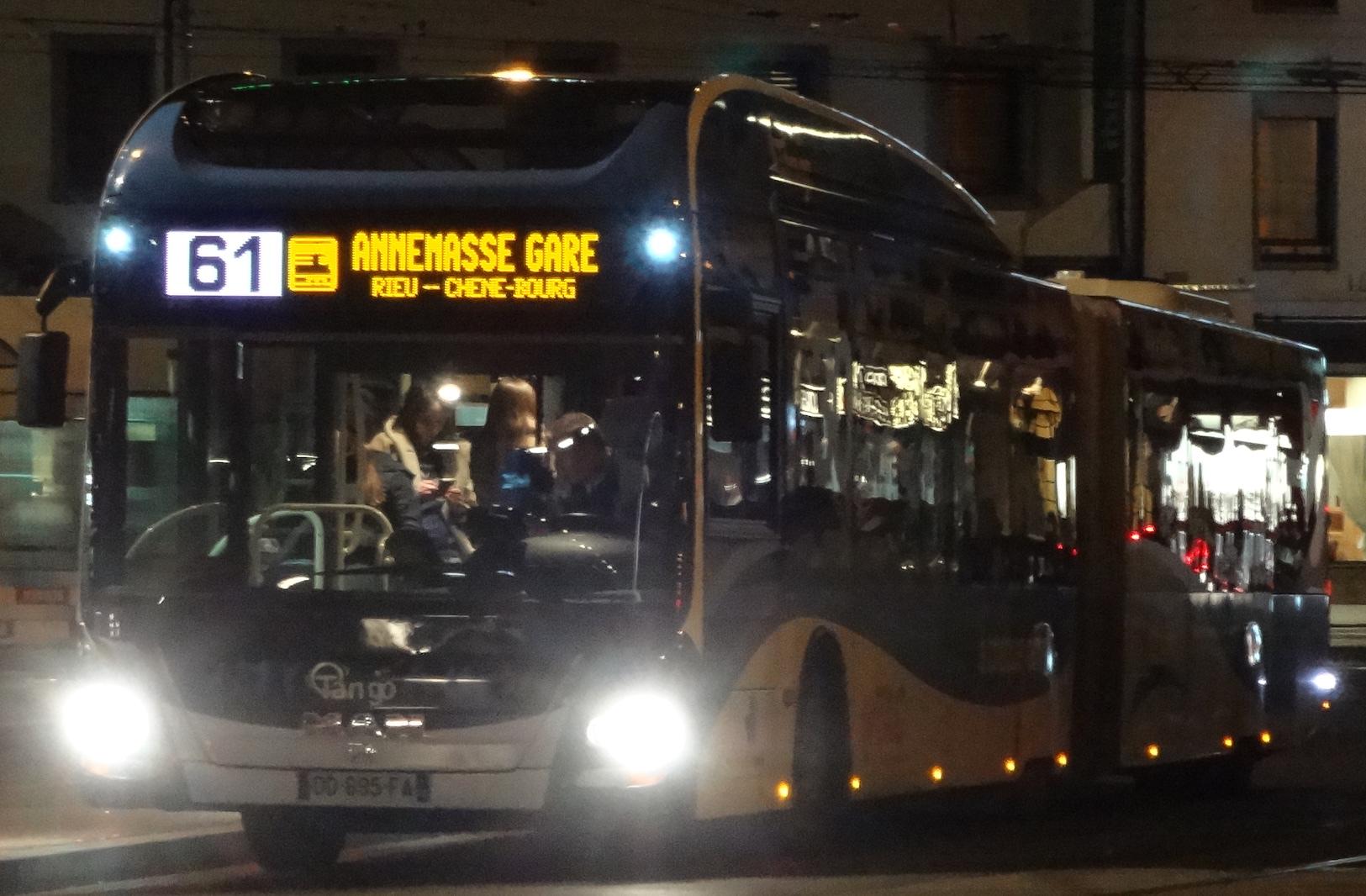 Bus TPG de la ligne 61, pour Annemasse, sur la place Cornavin, à Genève.